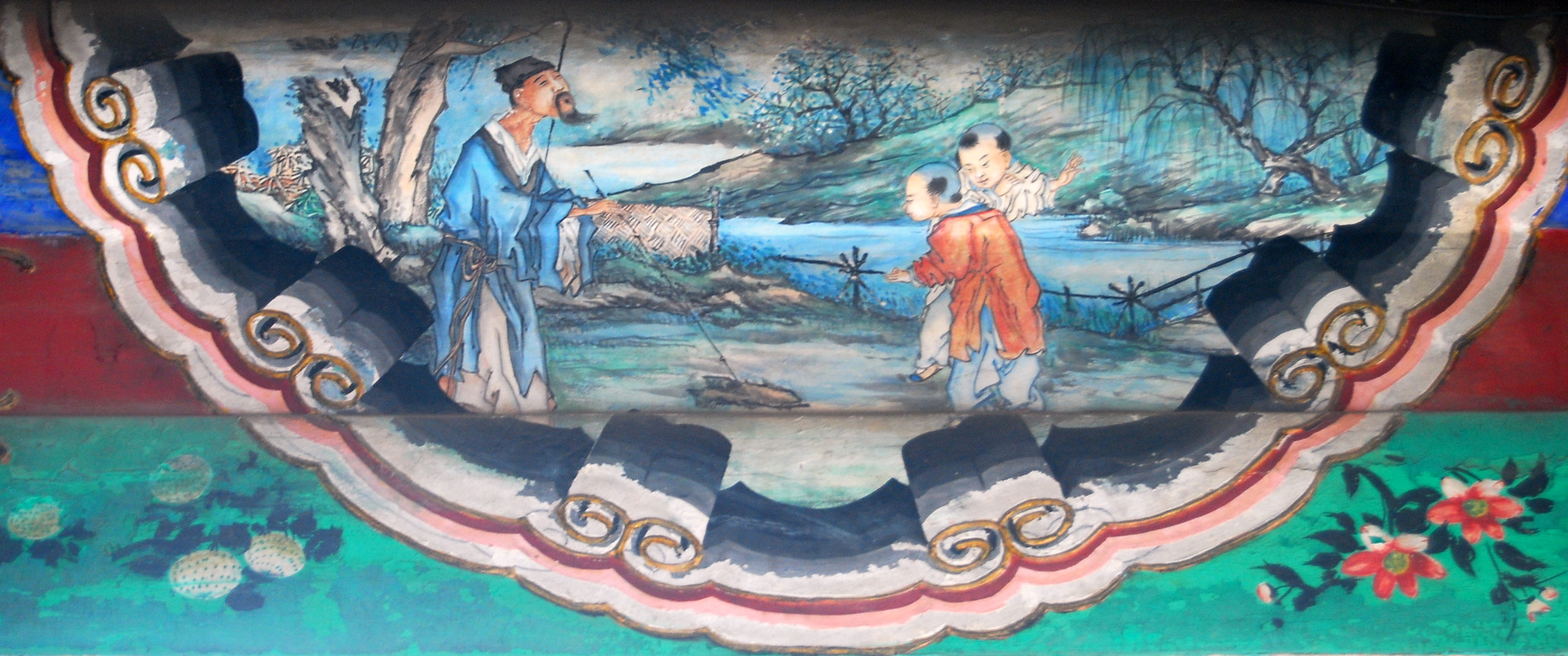 颐和园长廊上的彩绘：眼暗心明，仿清朝画家钱慧安作品